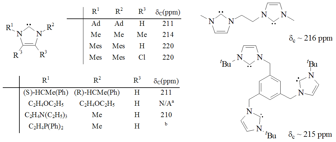 Imidazol2ylidenes